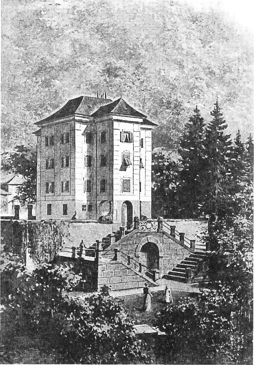 Schloss Elsenheim, Aquarell von Franz Kuhlstrunk